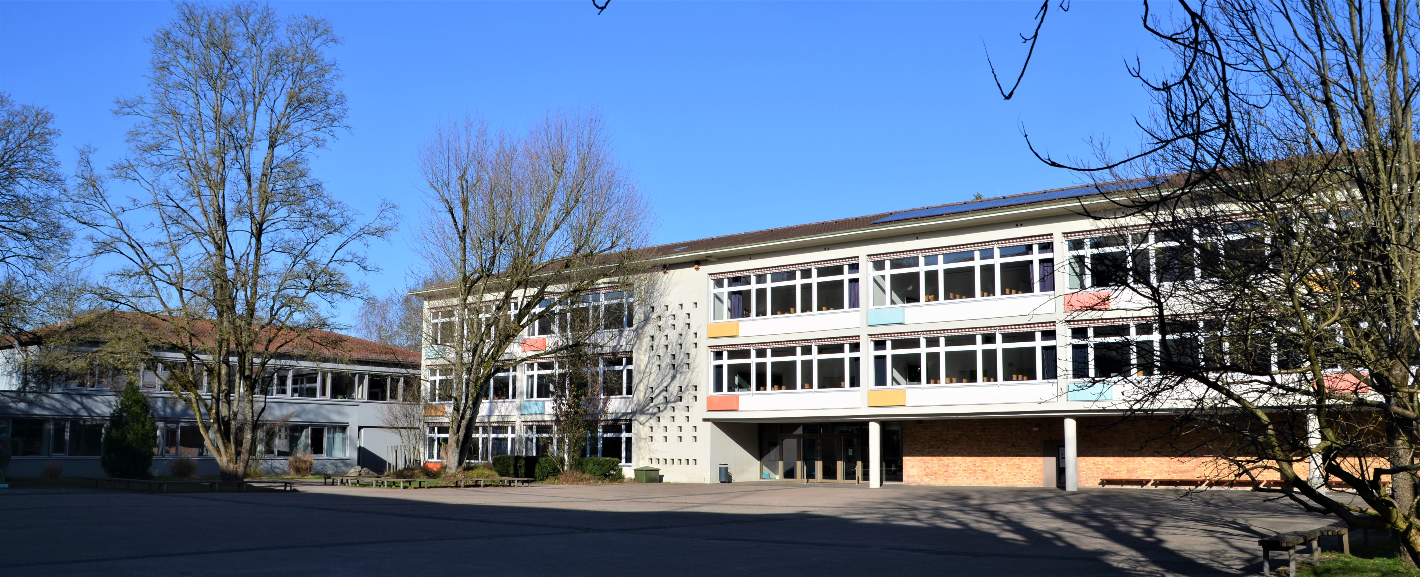 Schulhofansicht des Hans-Baldung-Gymnasium in Schwäbisch Gmünd